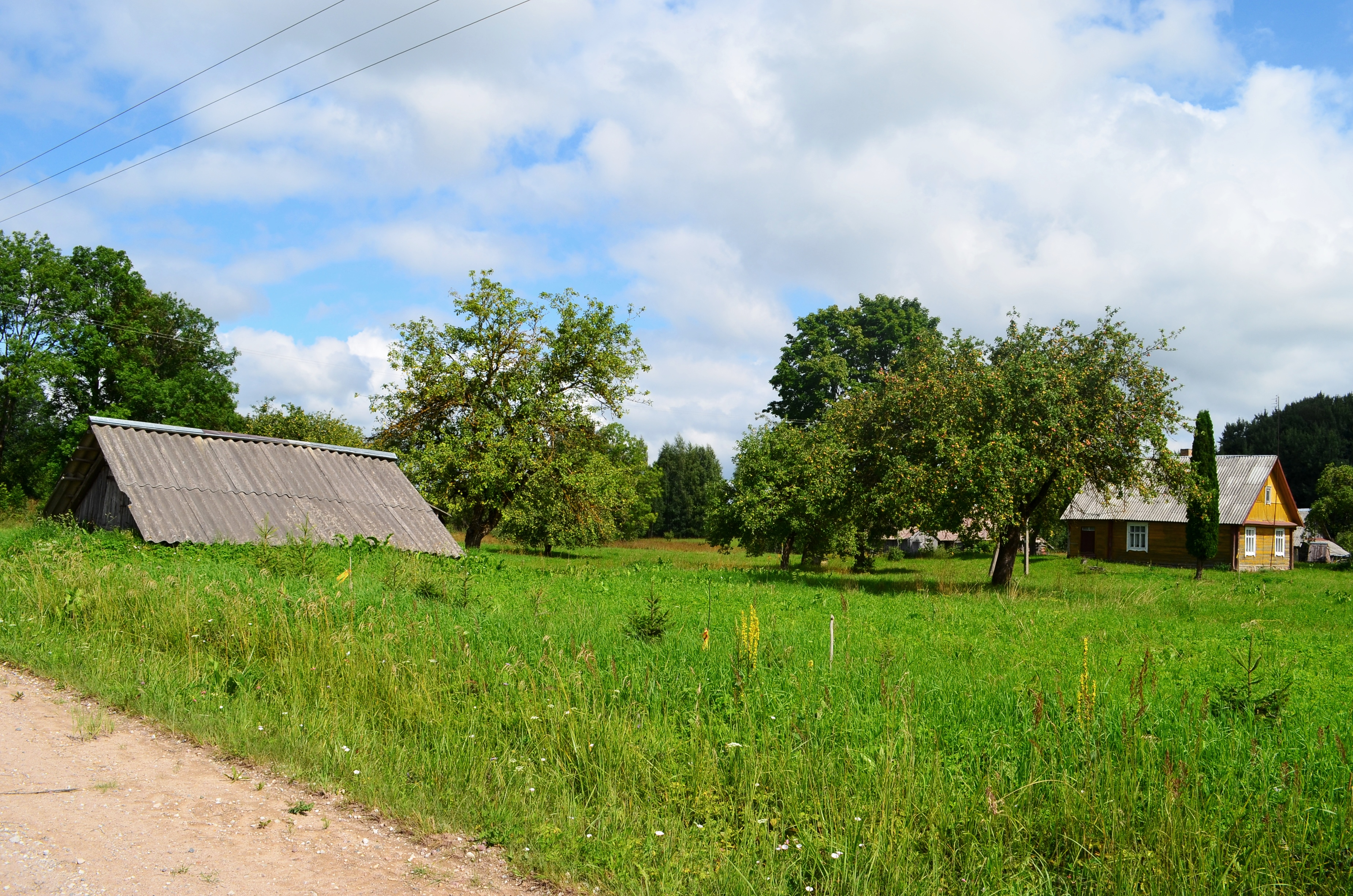 Grašių k., Utenos raj.